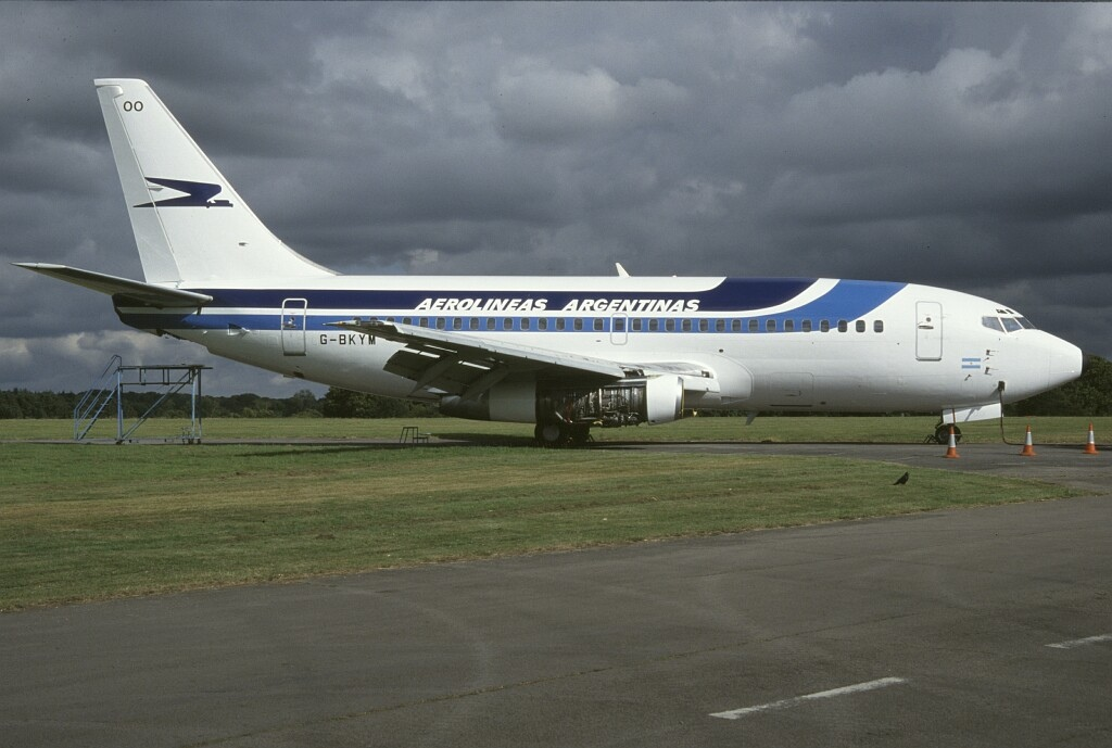 Un Aerolíneas Argentinas Boeing 737-200 de Aerolíneas en los '90